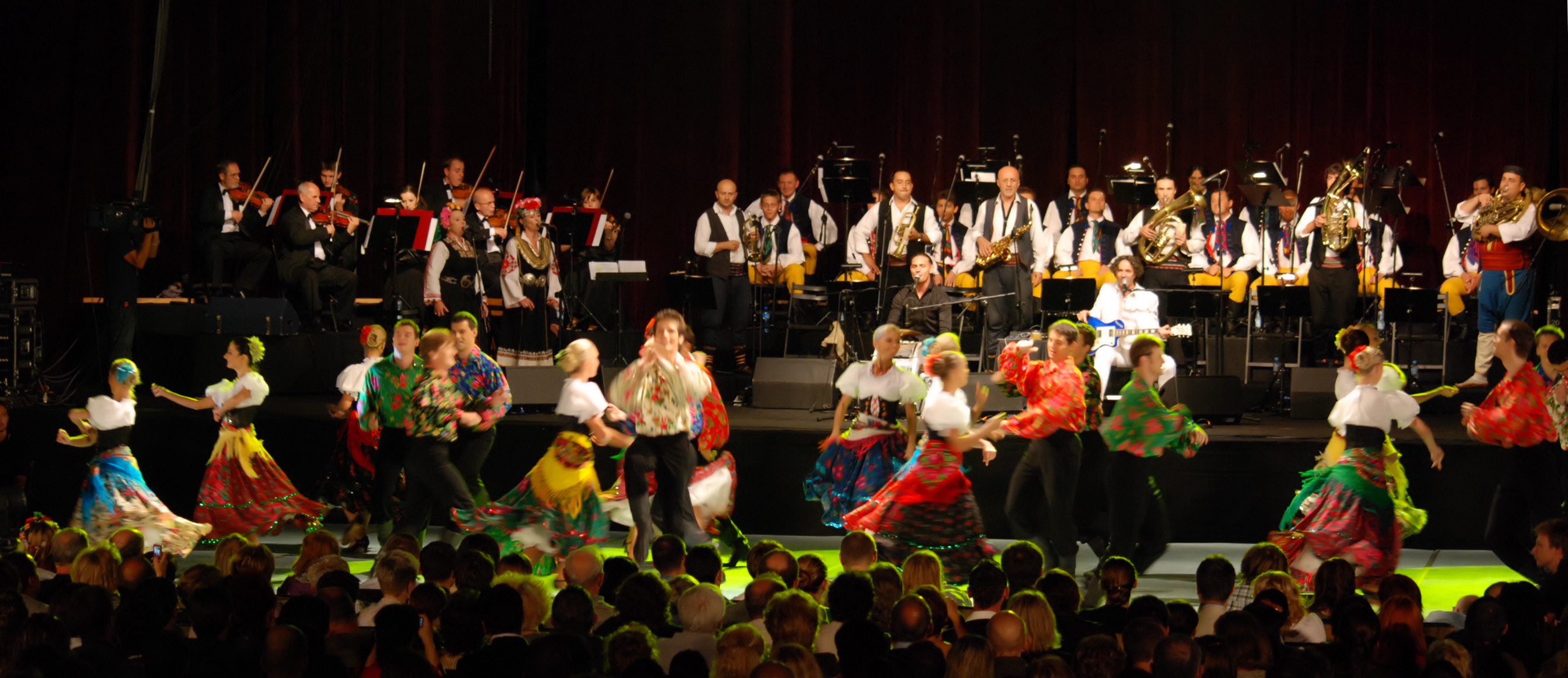 Jubileuszowy koncert Zespołu Pieśni i Tańca "Śląsk" oraz Gorana Bregovića wraz z "Wedding & Funeral Orchestra"